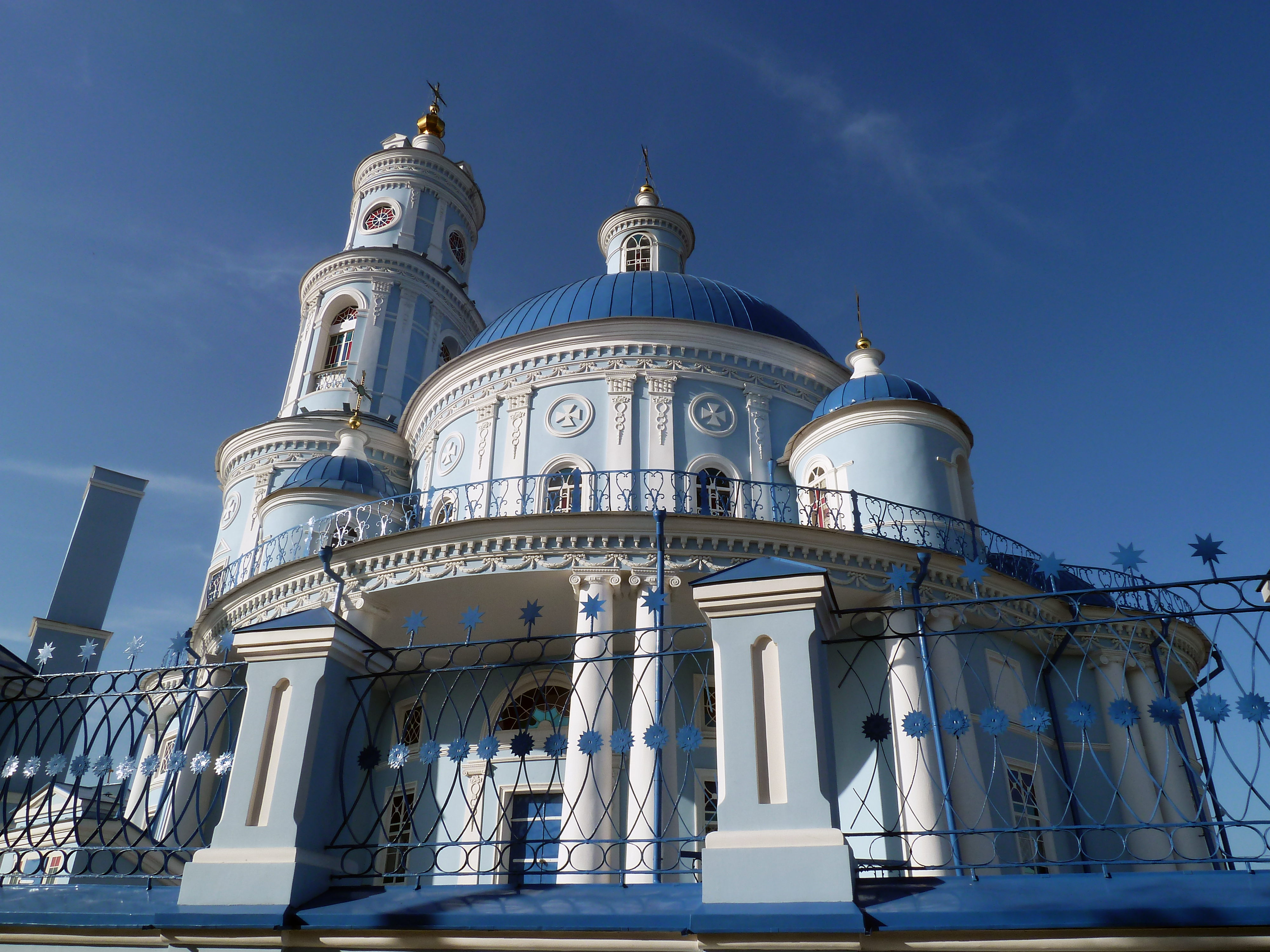 Казанская церковь (Иркутская область, Усолье-Сибирское, посёлок Тельма)